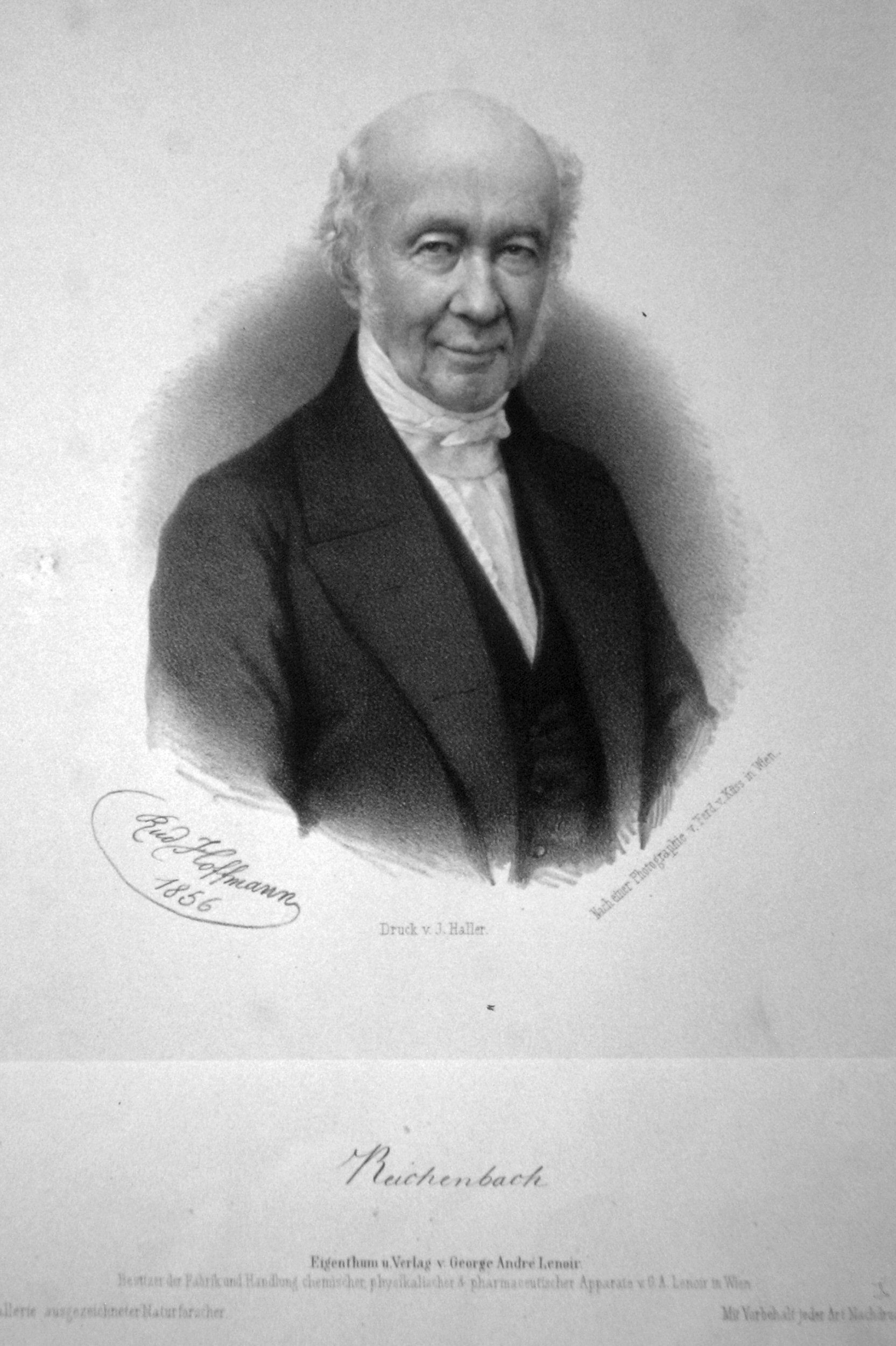 Karl von Reichenbach (1786–1869), österreichischer Chemiker, Industrieller und Naturforscher. Lithographie von Rudolf Hoffmann, 1856, nach einemr Photographie von Carl von Jagemann / Wien.